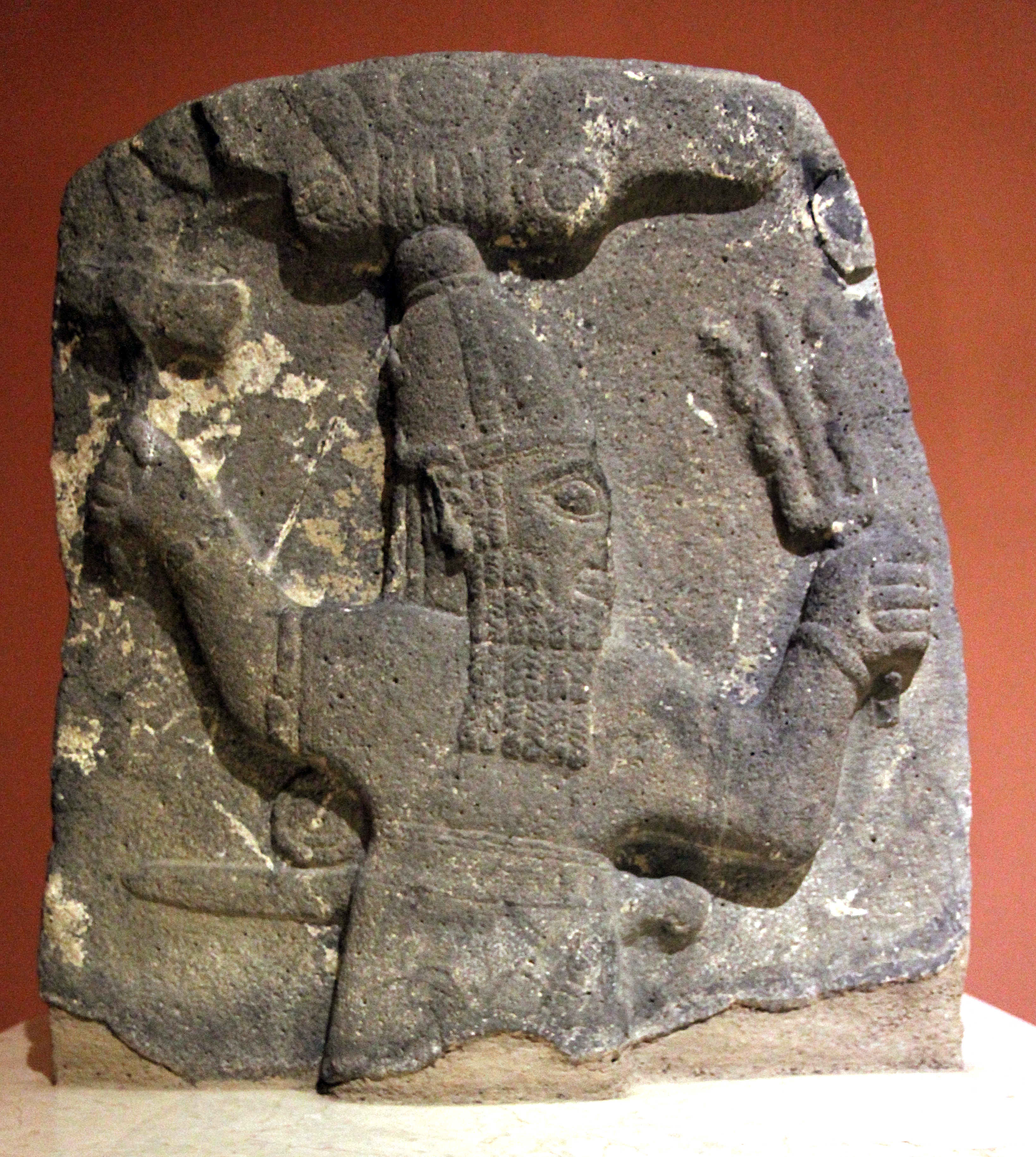 Archäologisches Museum Kahramanmaraş, Türkei, späthethitische Stele von Kürtül mit einer Darstellung des Wettergottes